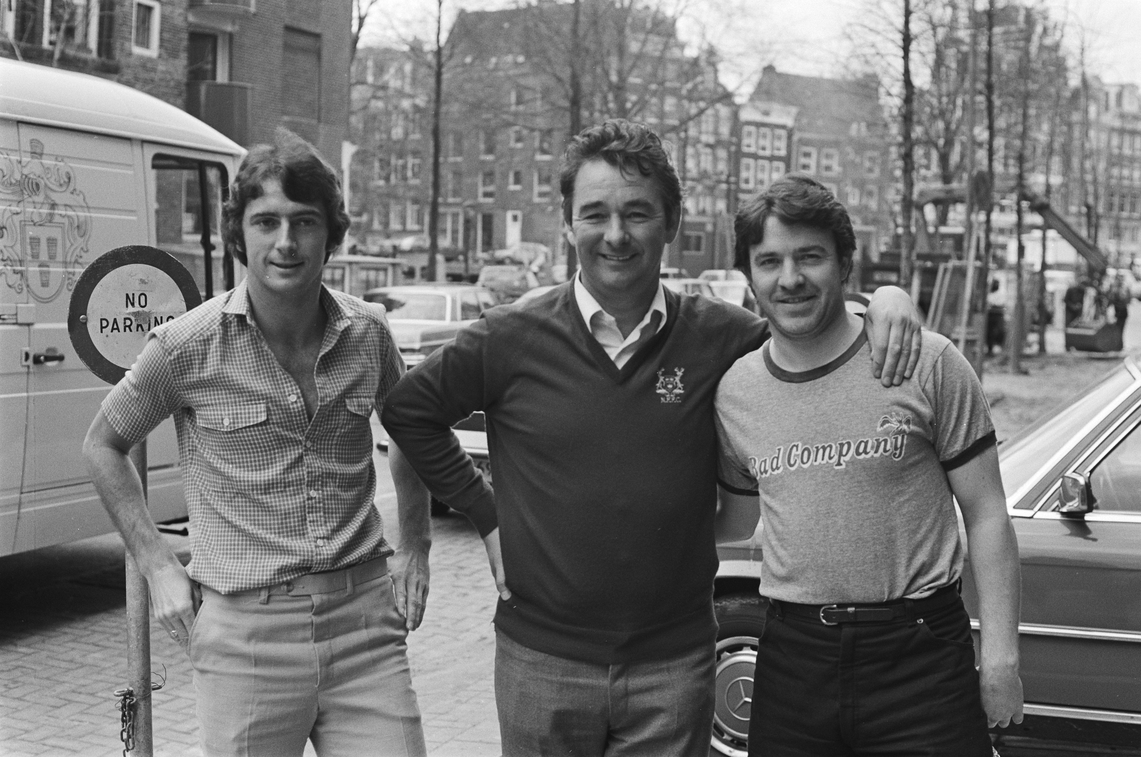 Amsterdam, 22 aprile 1980. Parte della squadra del Nottingham Forest FC — da sinistra: l'attaccante Trevor Francis, l'allenatore Brian Clough e l'ala sinistra John Robertson — alla vigilia della semifinale di ritorno della Coppa dei Campioni 1979-80 contro l'AFC Ajax.